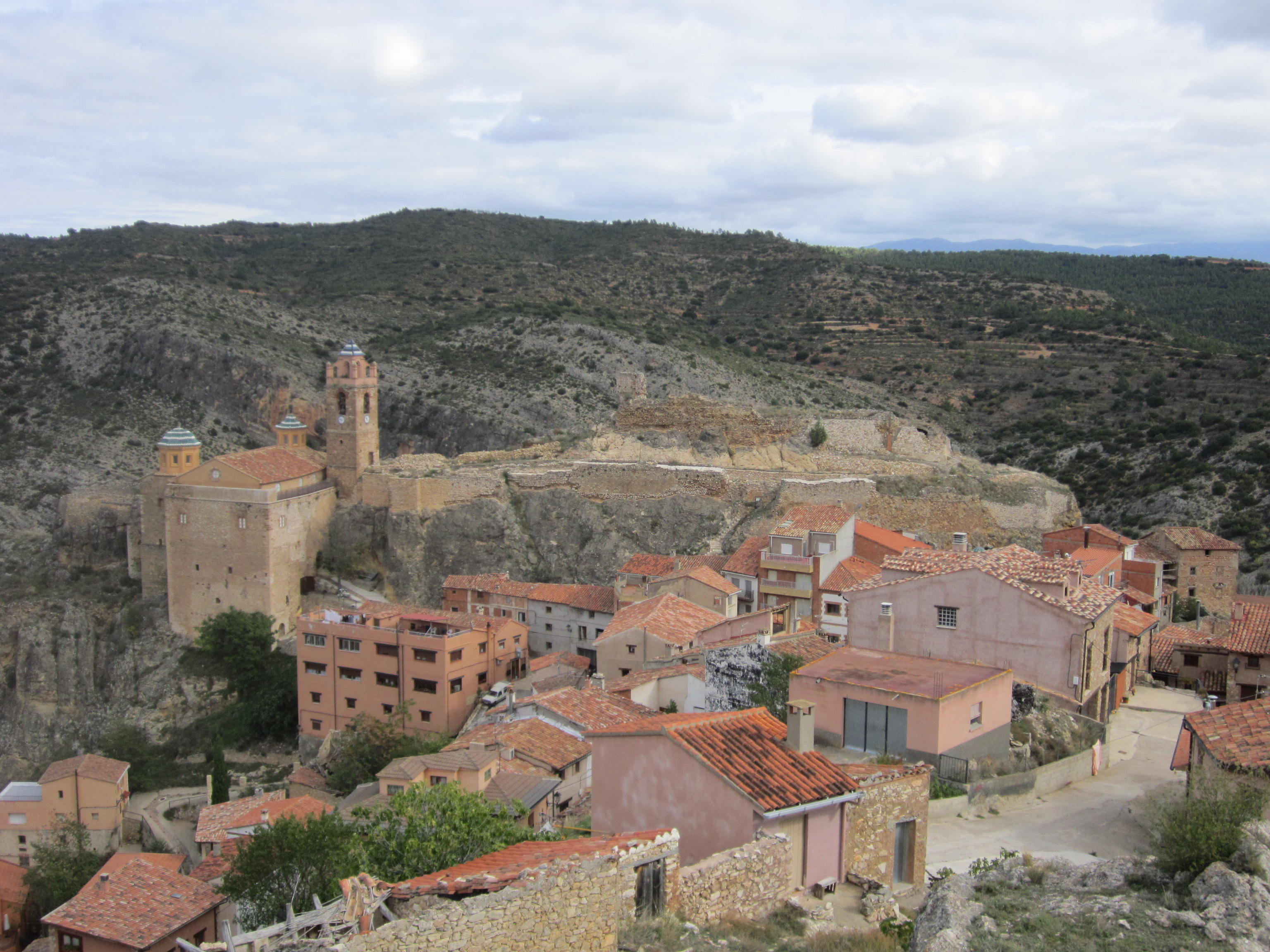 Vista panorámica de Castielfabib desde la Torreta